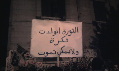 لافته يحملها احد المتظاهرين في شارع محمد محمود في الذكرى الاولى لأحداث شارع محمد محمود (تصورير احمد محمود)